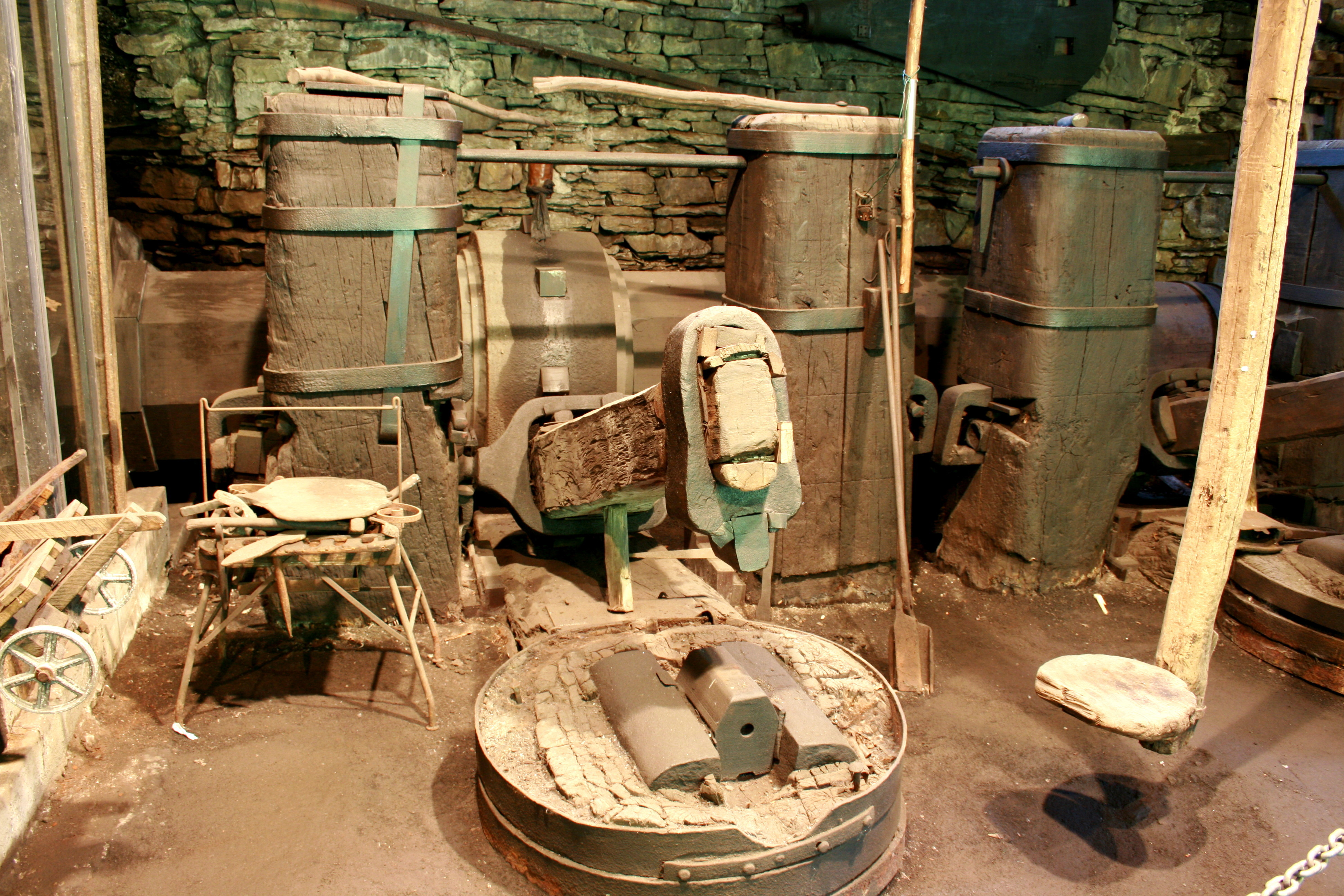 Bremecker Hammer in Lüdenscheid